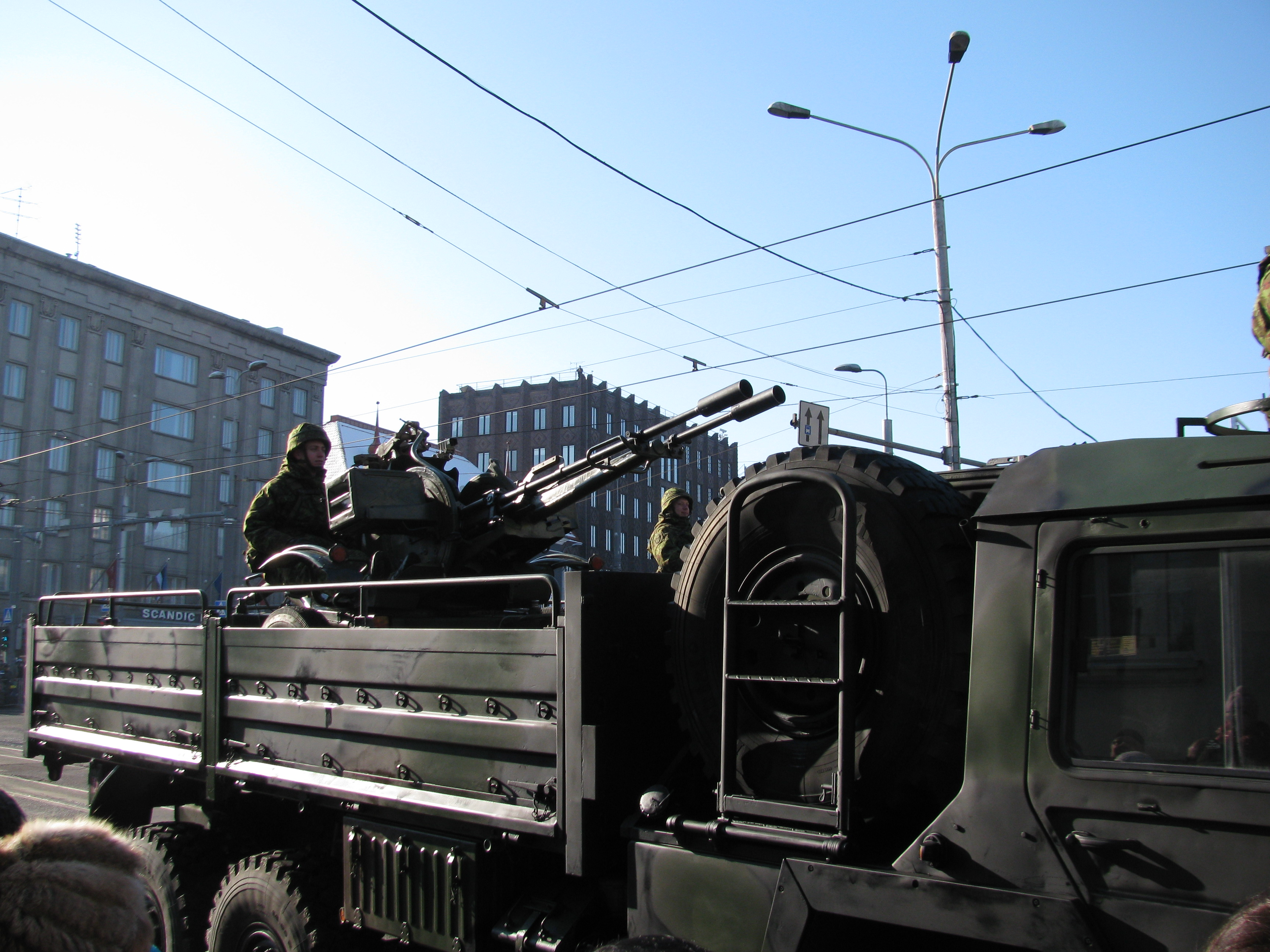 ZU-23-2 Kaitseväe paraadil